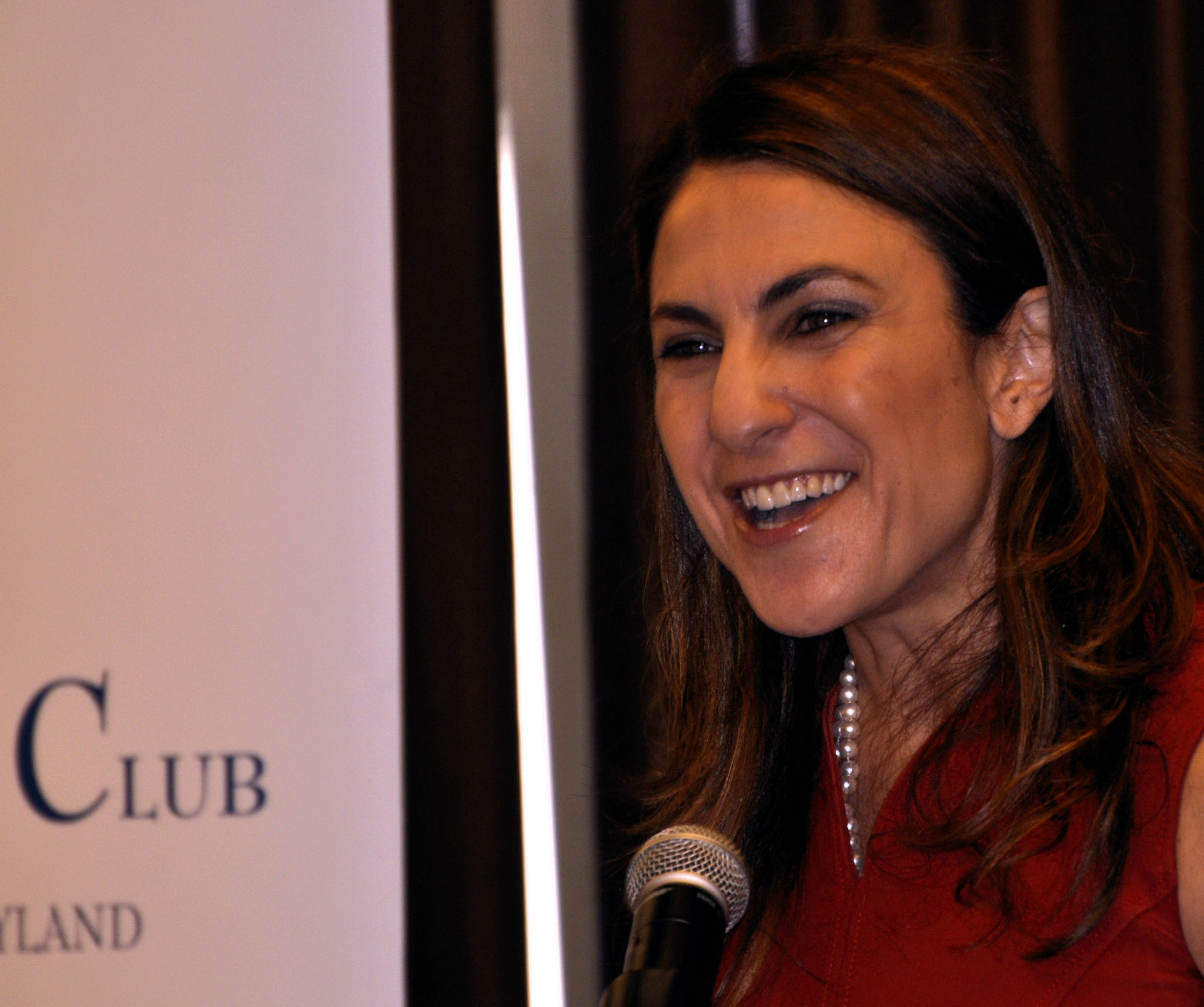 2015-10-06 WDC_0045 Gayle Tzemach Lemmon